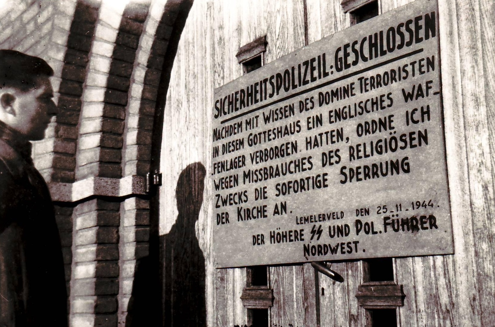 Door de SS vervaardigd bord dat na de inval door de S.D. opgehangen is aan de deur van de gereformeerde kerk te Lemelerveld.